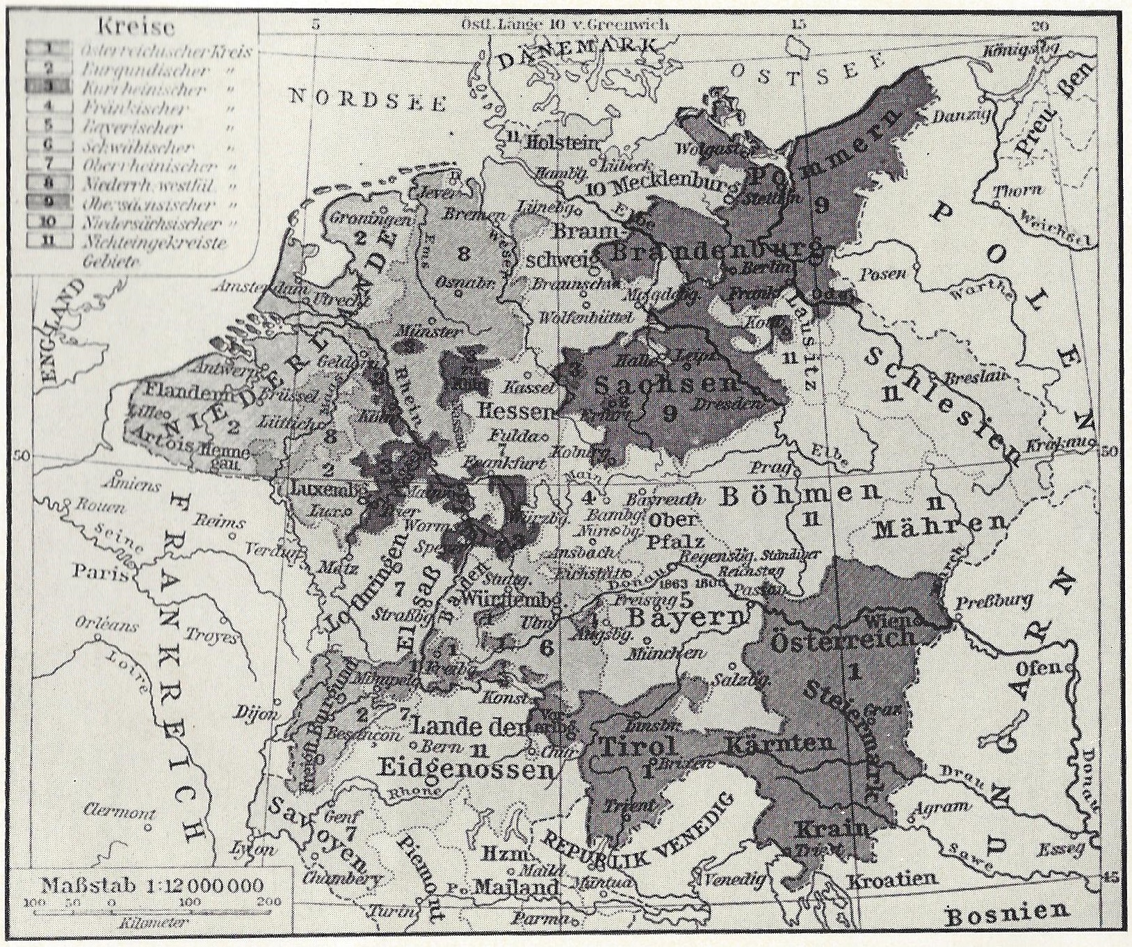 Amtliche Kreiseinteilung des Deutschen Reiches von 1521 bis 1806. Sie war sehr oft maßgebend für die Erteilung der Rekrutierungscantone der Landsmannschaften auf den deutschen Universitäten in der Zeit bis 1820.